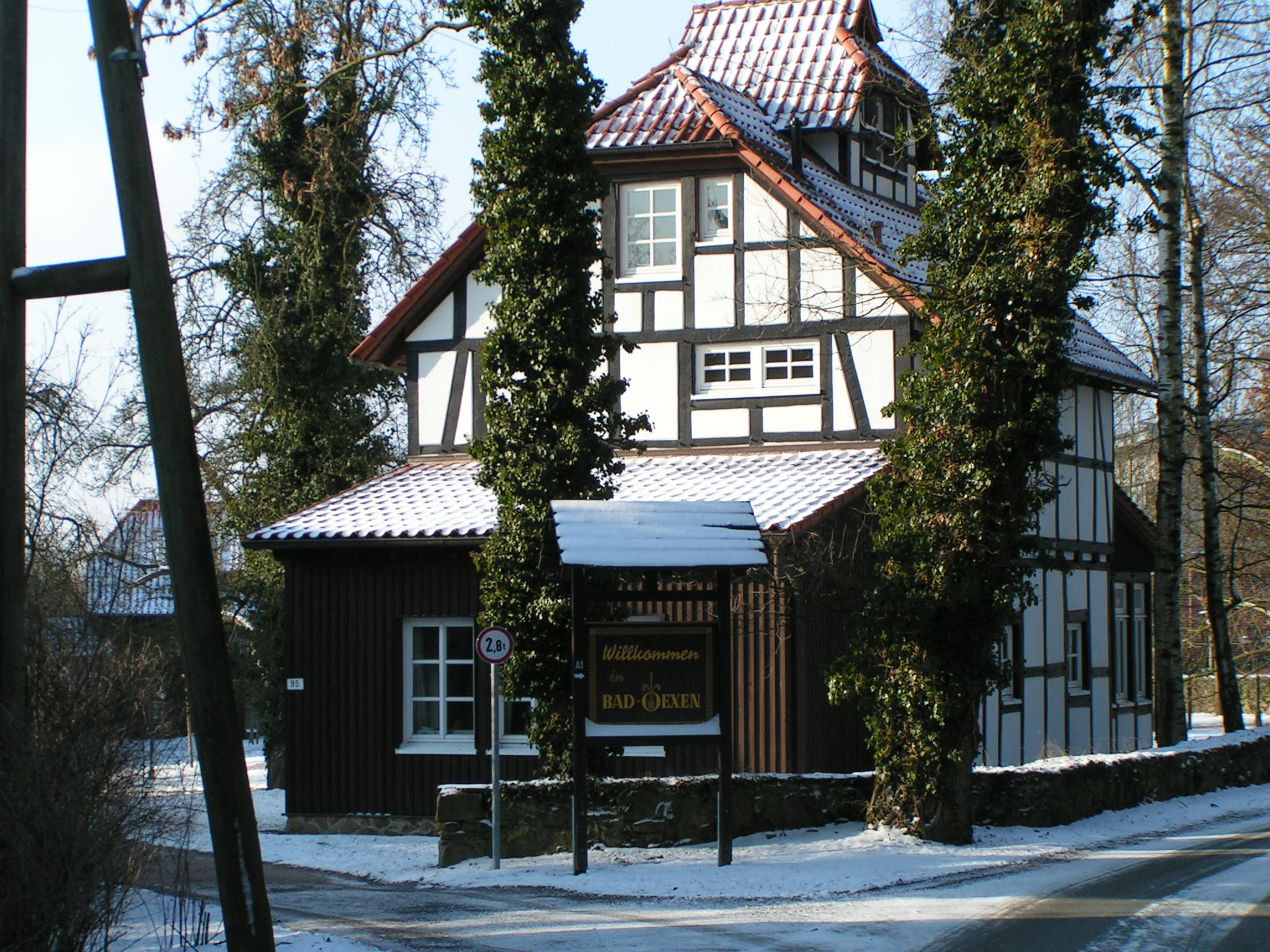 Bad Oexen: Villa Kunterbunt (Kinderarbteilung der Klinik)